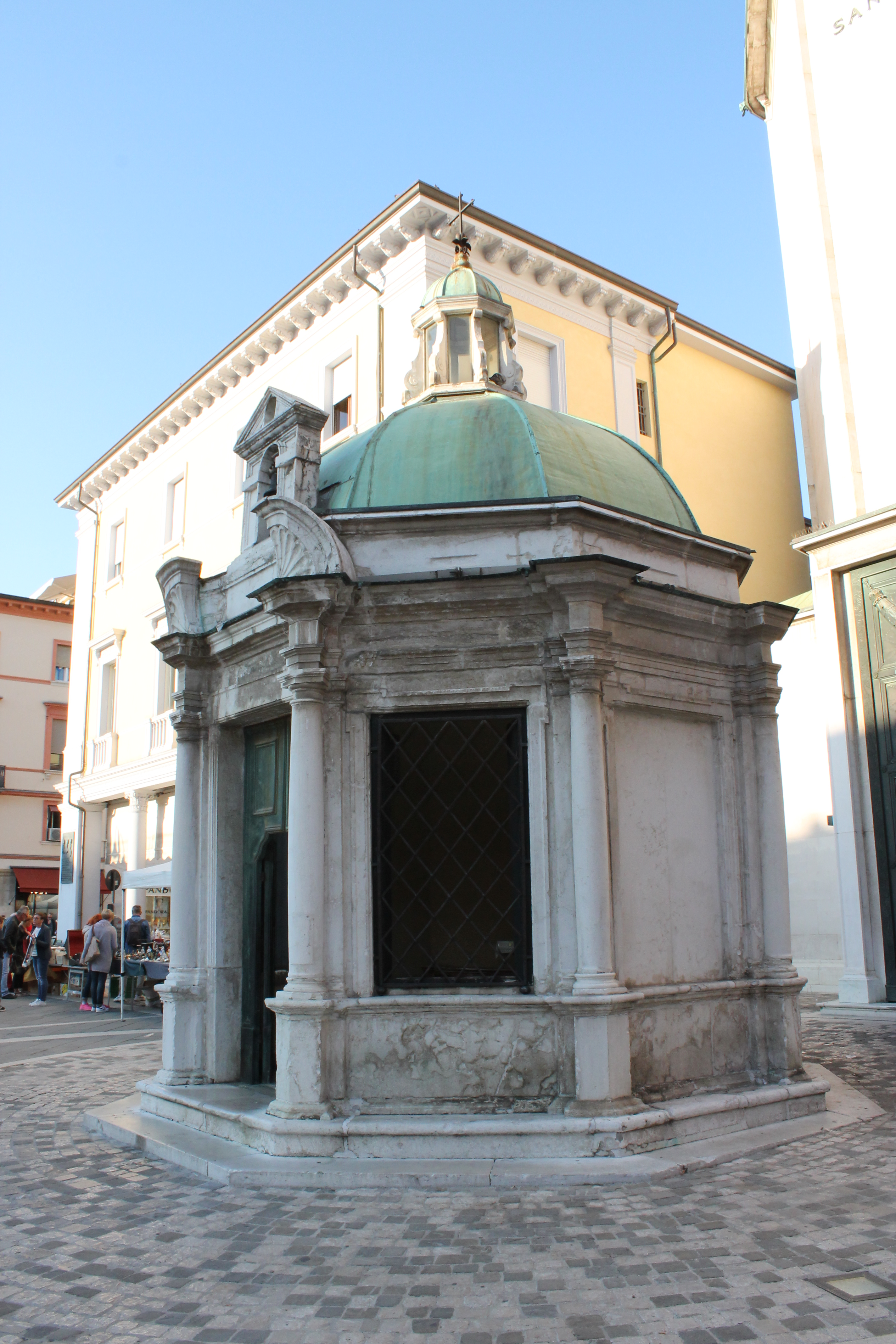 Tempietto di Sant'Antonio in Piazza Tre Martiri This is a photo of a monument which is part of cultural heritage of Italy.